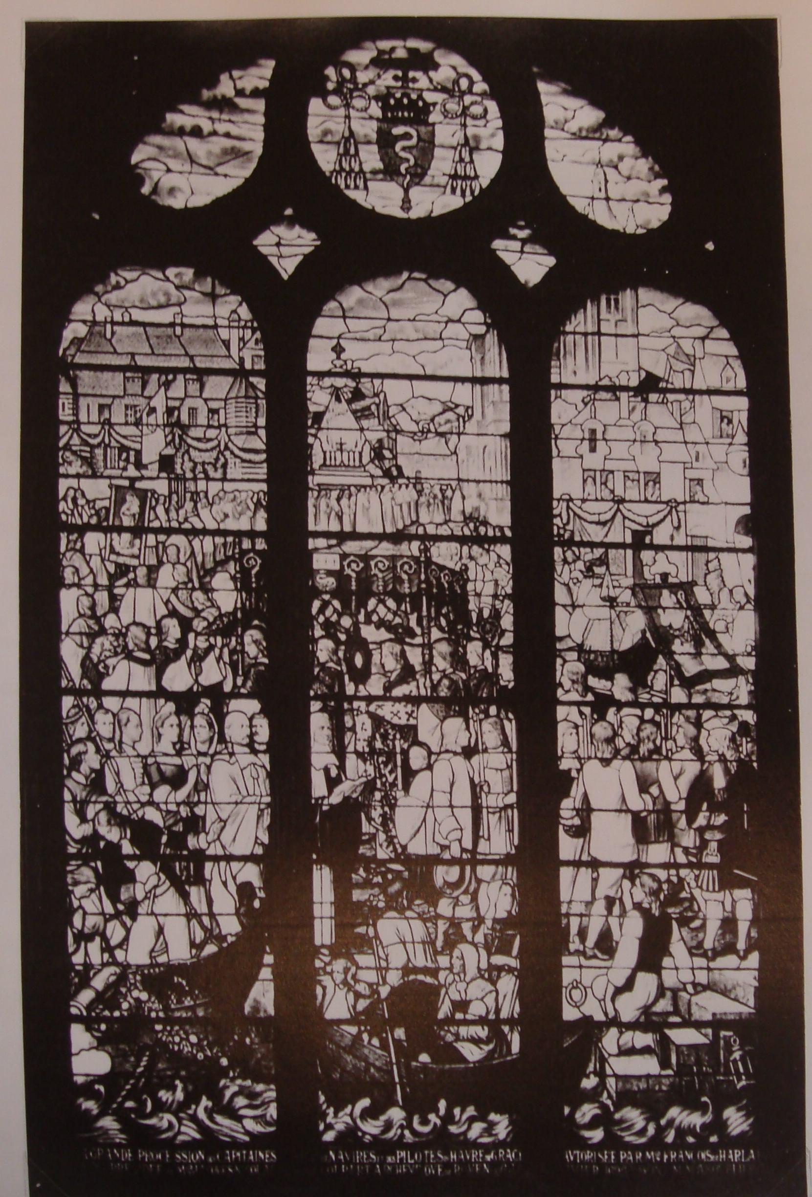 La grande procession des pilotes. La procession débute près du logis du roi, pour aller à Notre-Dame. Les bannières sont en têtes, tenus par des pilotes et précédés par le clergé, dont un évêque (certainement de Rouen). Des marins tiennent un dais décoré de plusieurs crosses. Au fond sur les côtés membres de la confrérie des capitaines, maîtres et pilotes défilent tenant des cierge allumés. Sur le long du quai des embarcations; près de l'escalier du quai des femmes et des enfants (description selon la légende de la photo).